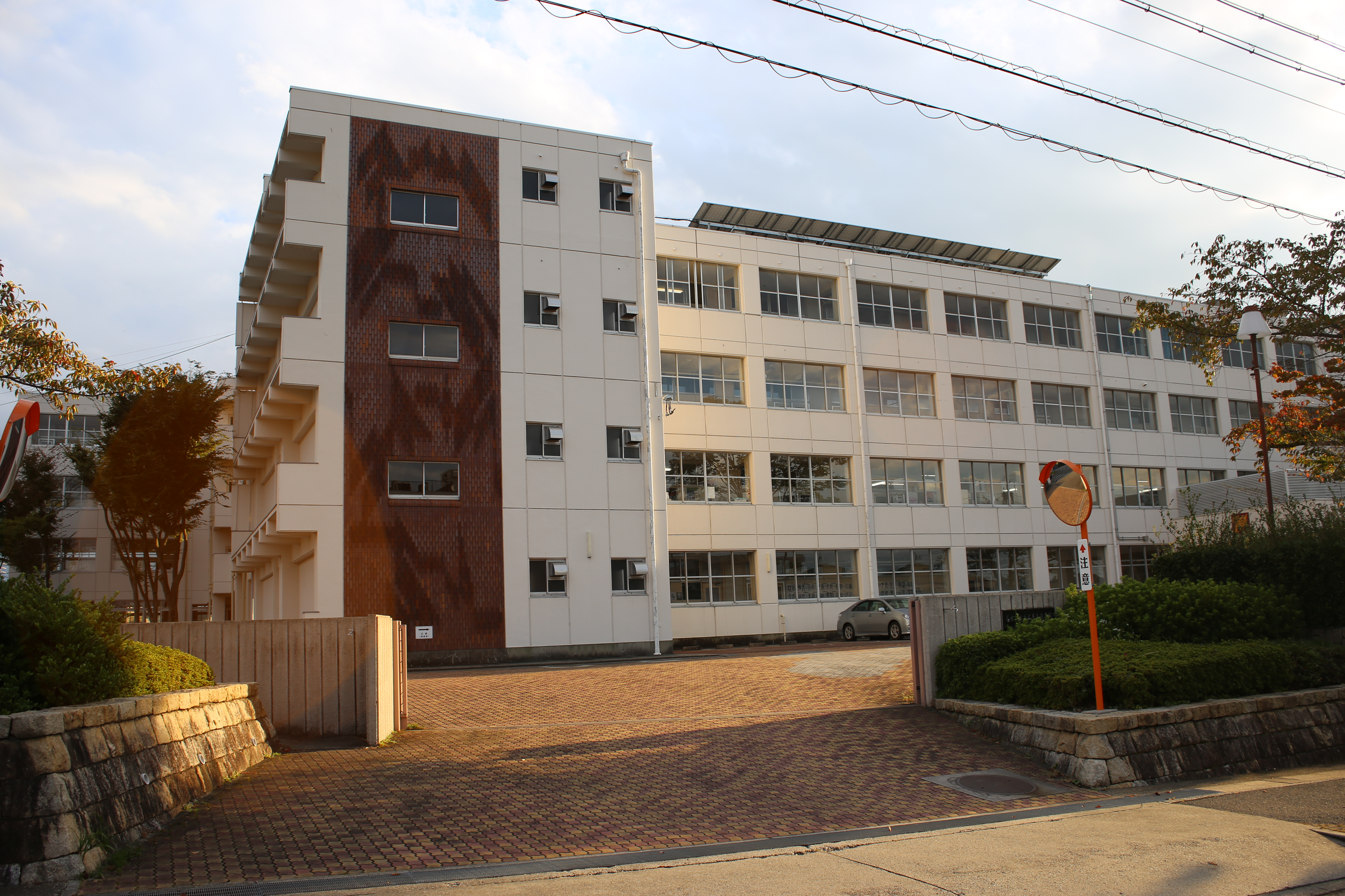 名古屋市名東区大針の名古屋市立名東高等学校を北側公道東側より撮影